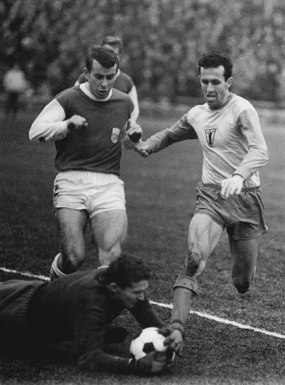 Zentralbild-Studré Stu-Qu 26.11.1966 Berlin: Fußball-Oberliga-Punktspiel FC Vorwärts Berlin gegen FC Carl Zeiß Jena 0:1 - Durch seinen wagemutigen Einsatz und seine glänzenden Paraden bewahrte der Jenaer Torwart Wolfgang Blochwitz (am Boden) seine Mannschaft vor einem Treffer. Links der Jenaer Spieler Peter Rock und rechts Jürgen Piepenburg (FC Vorwärts Berlin) können nicht mehr eingreifen. Der FC Vorwärts unterlag am 26.11.1966 im Berliner Jahn-Stadion in der Cantianstraße dem FC Carl Zeiss Jena mit 0:1 Toren.